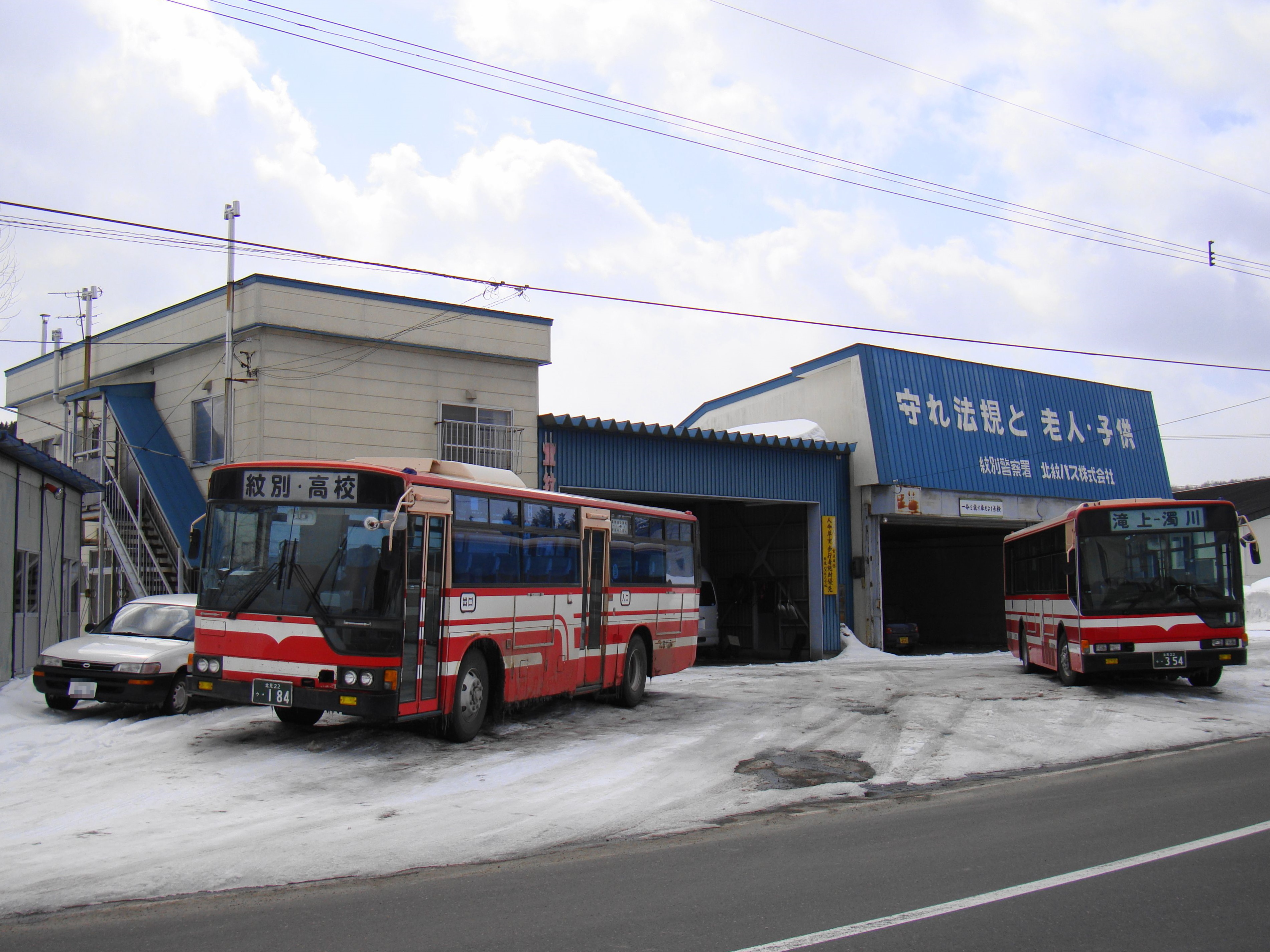 Takinoue depot